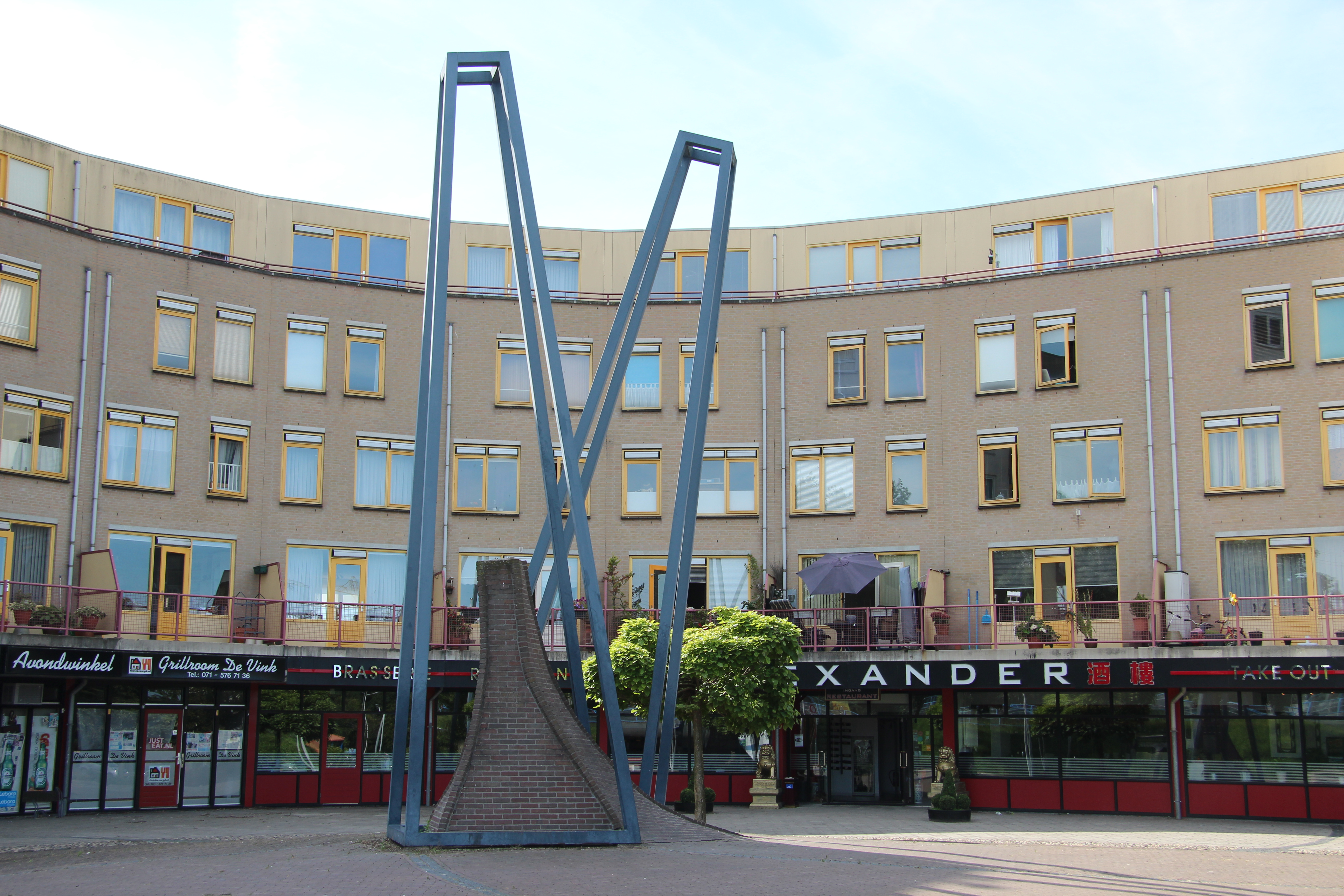 Cune van Groeningen - Monument voor Joke Smit - 1997, Alexandrine Tinneplein (station De Vink) in Leiden